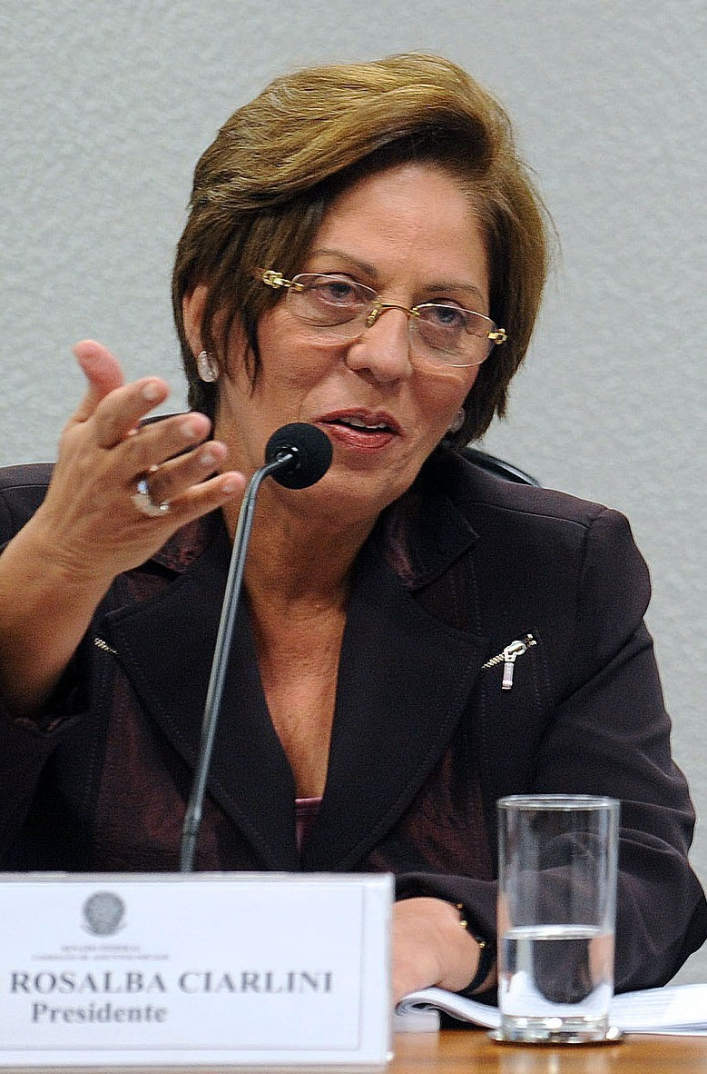 Senadora do Brasil, Rosalba Ciarlini (RN)